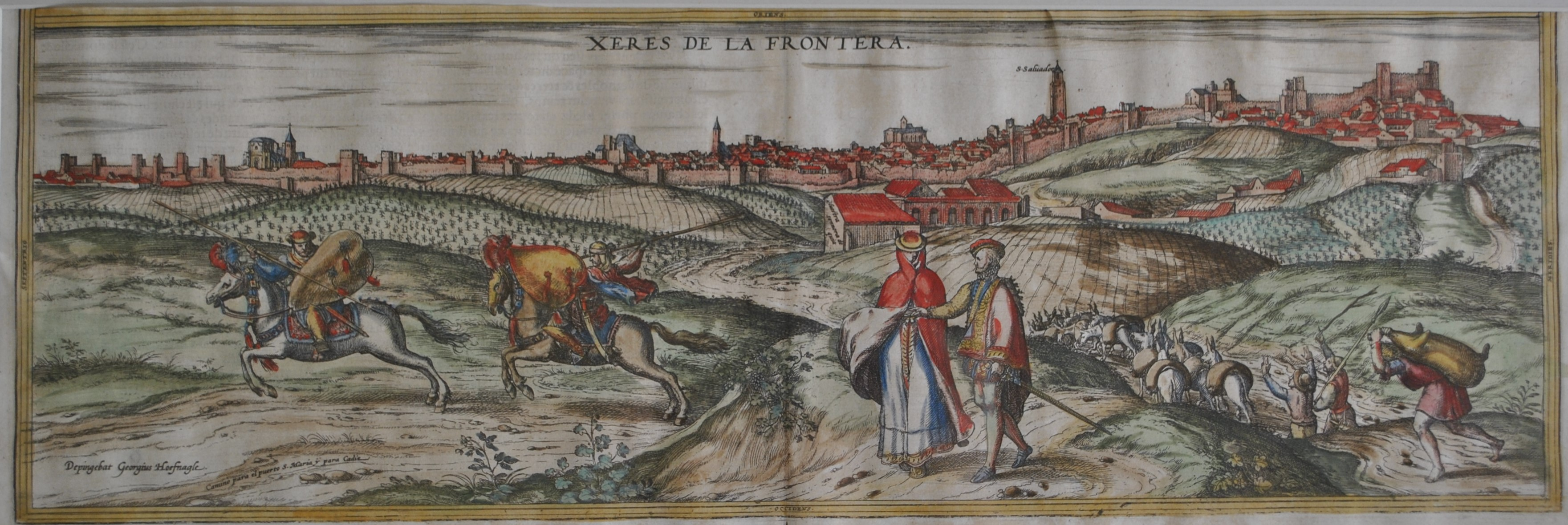 Grabado al cobre de 1570, realizado por Frans Hogenberg a partir de un dibujo original de Joris Hoefnagel. Coloreado en la época. Actualmente conservado en Jerez de la Frontera.